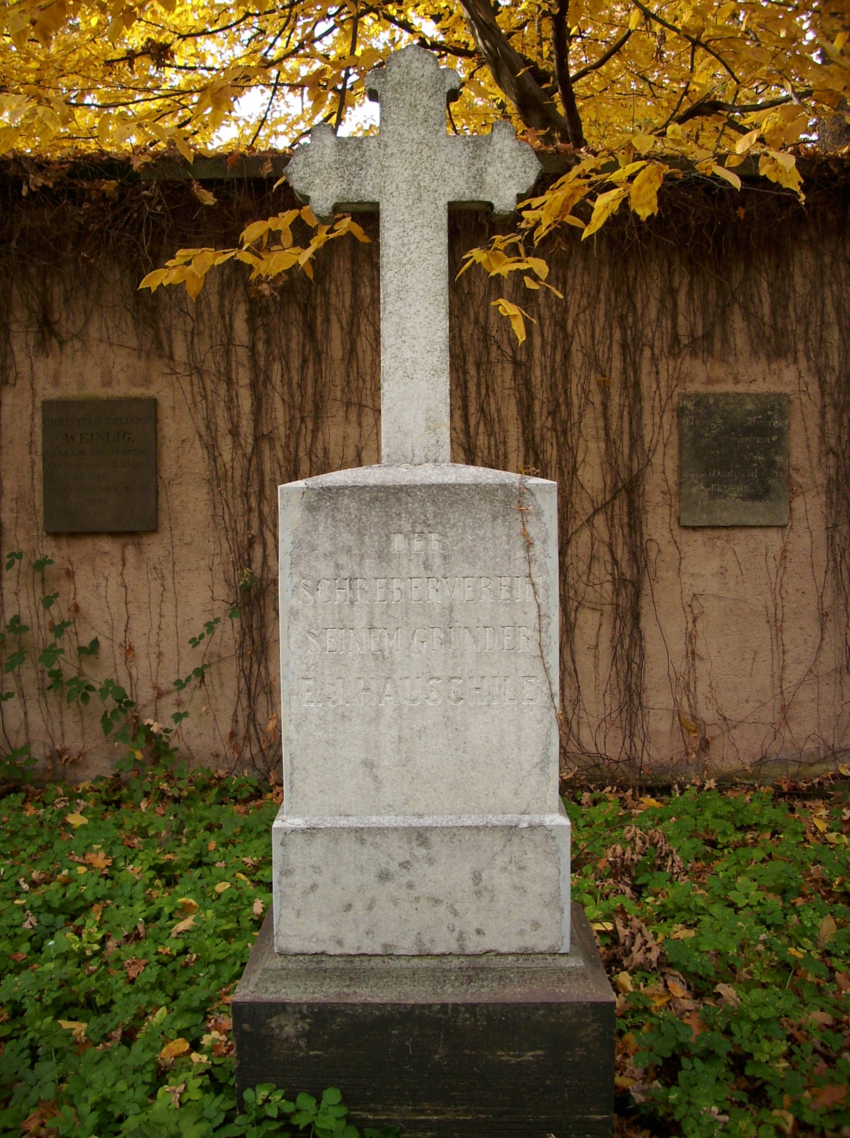 Grabstein Ernst Innozenz Hauschild, Alter Johannisfriedhof Leipzig